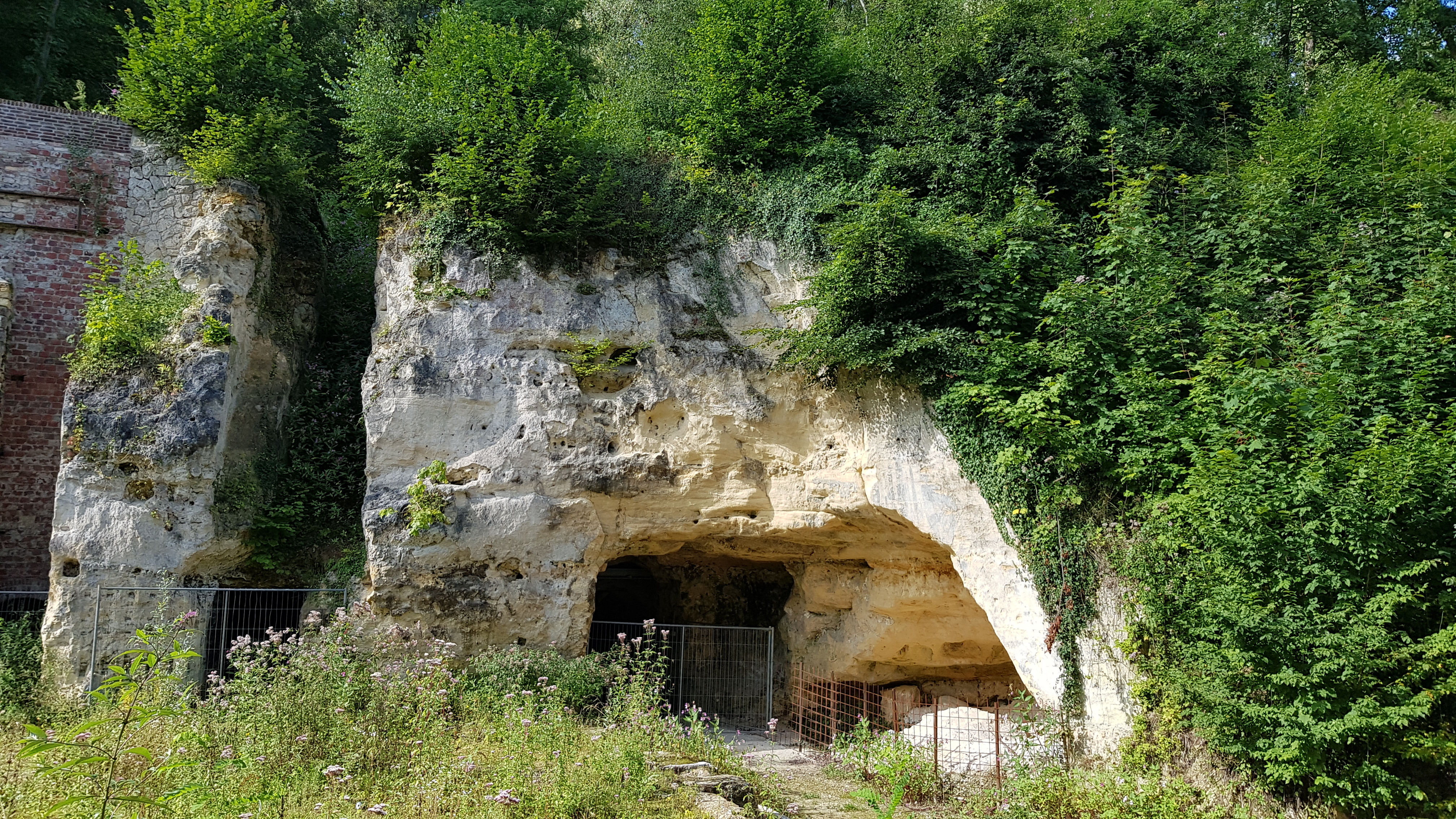 Groeve achter de Kalkbranderij, Geulhem, Nederland